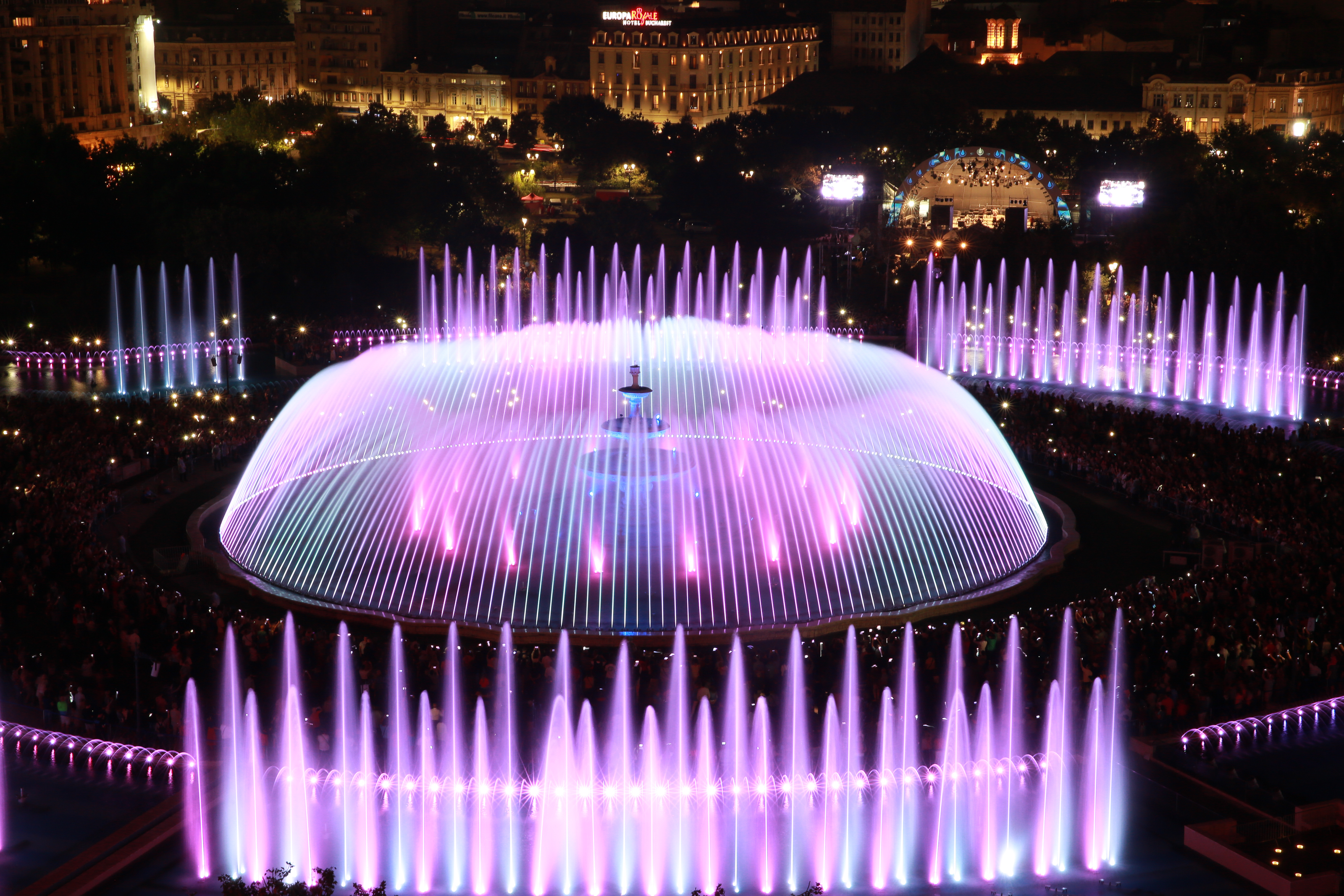 Fântâna principală luminată în cadrul spectacolului din 18 septembrie 2018